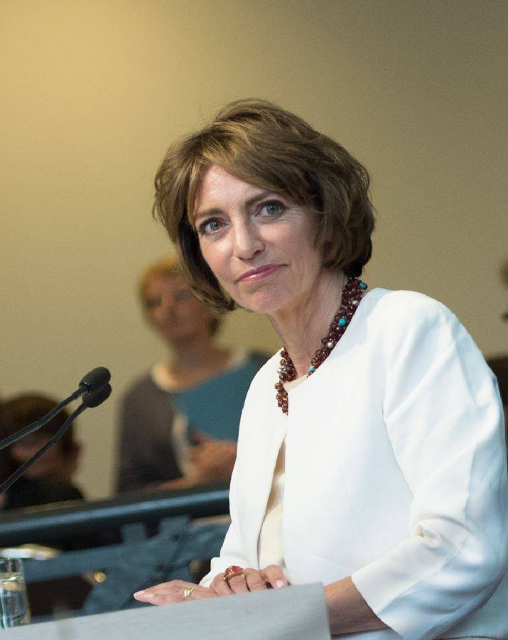 Marisol Touraine, ministre des Affaires sociales et de la Santé du gouvernement de Manuel Valls en juillet 2015 lors d'une conférence de presse